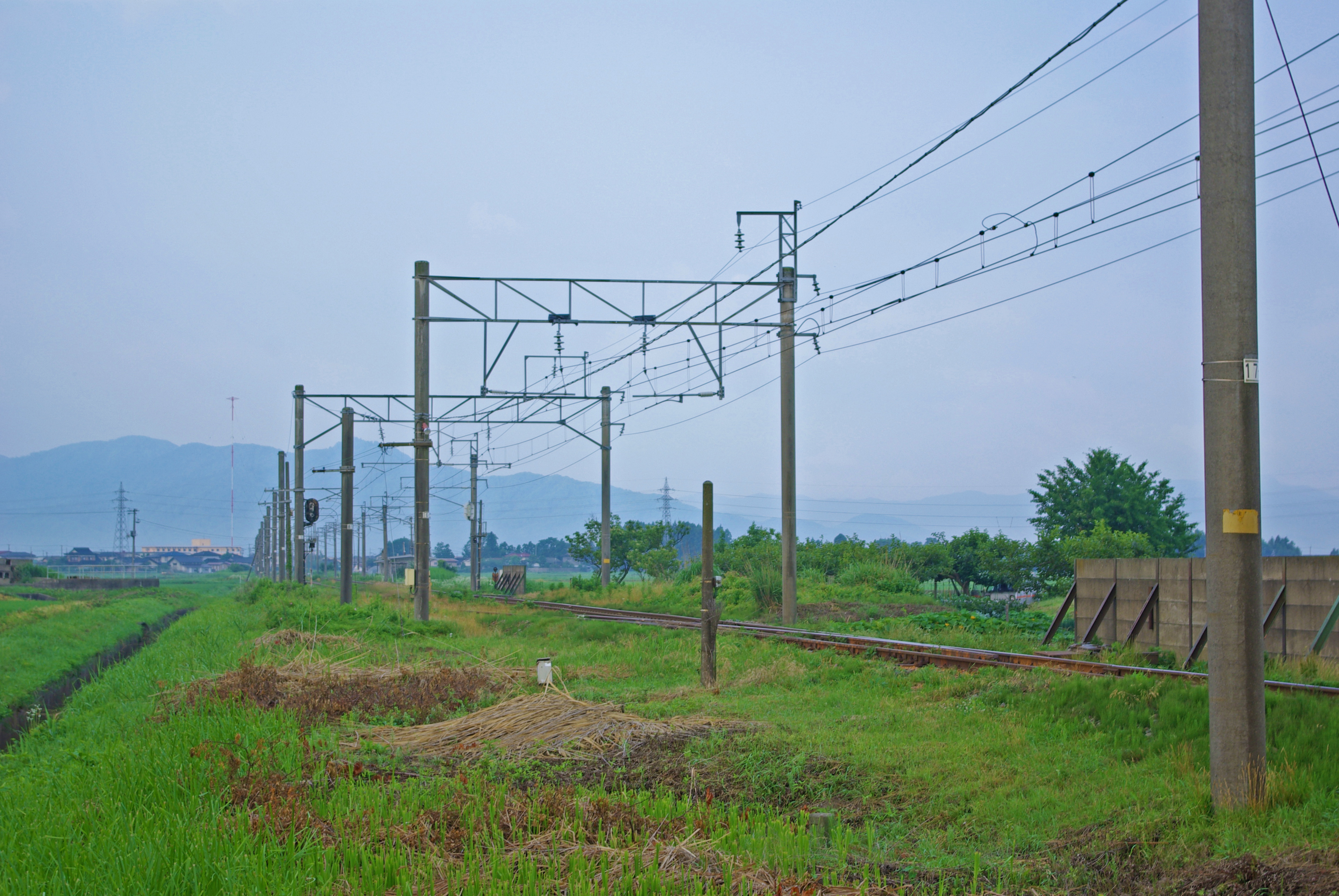 東日本旅客鉄道羽越本線幕ノ内信号場